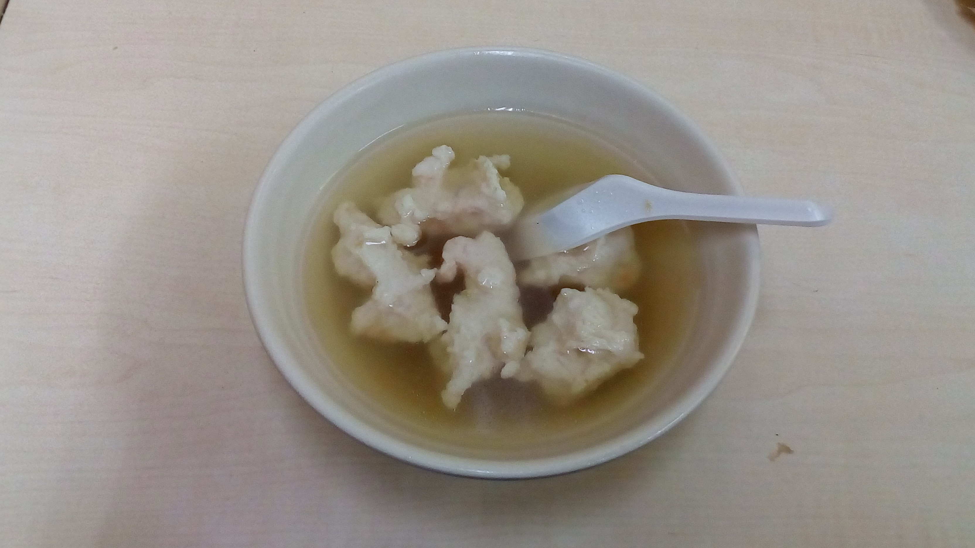 一碗最標準的經典臺灣小吃，蝦仁羹。